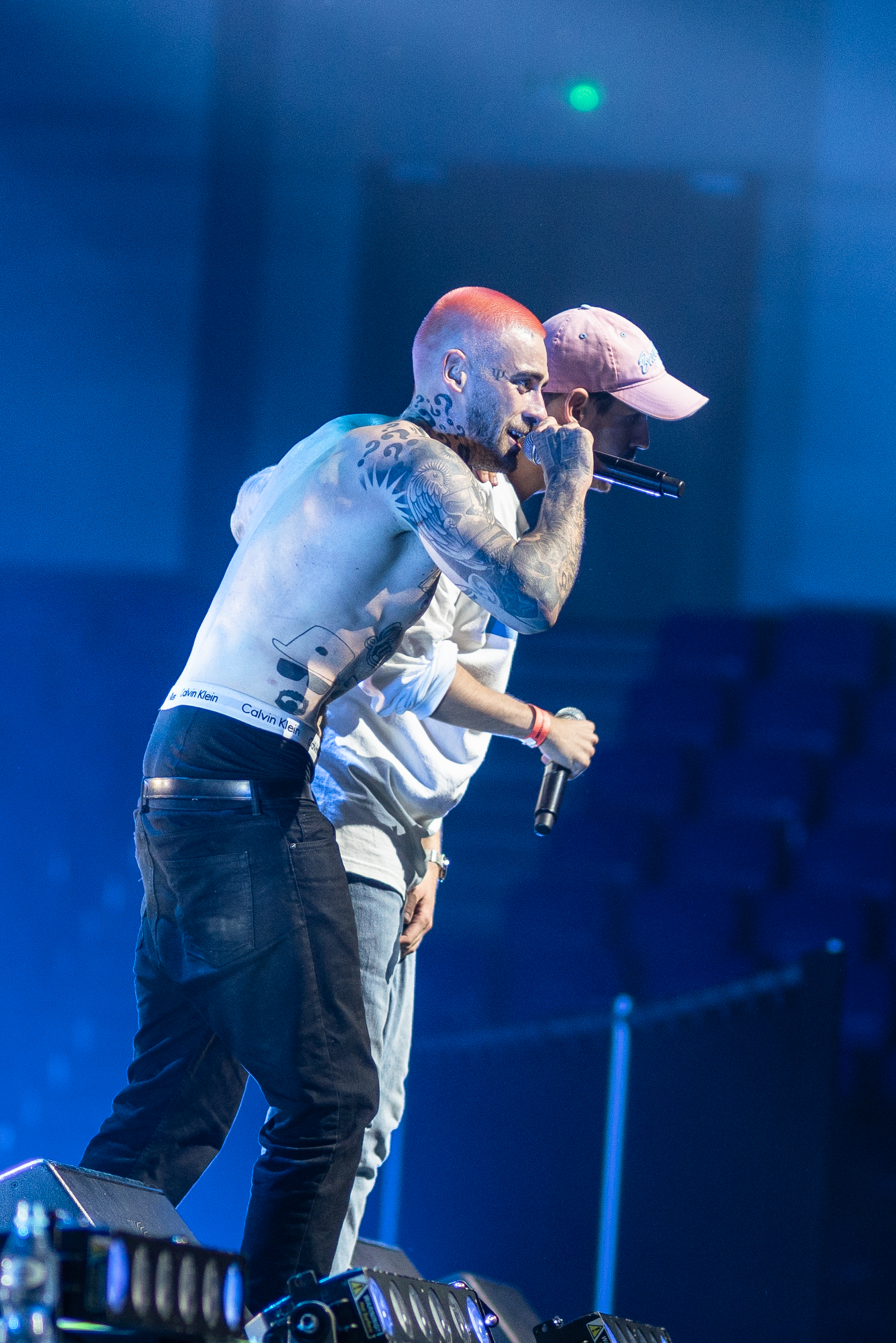 Taconafide podczas koncertu w Warszawie w ramach trasy Ekodiesel Tour promującej debiutancki album Soma 0,5 mg.